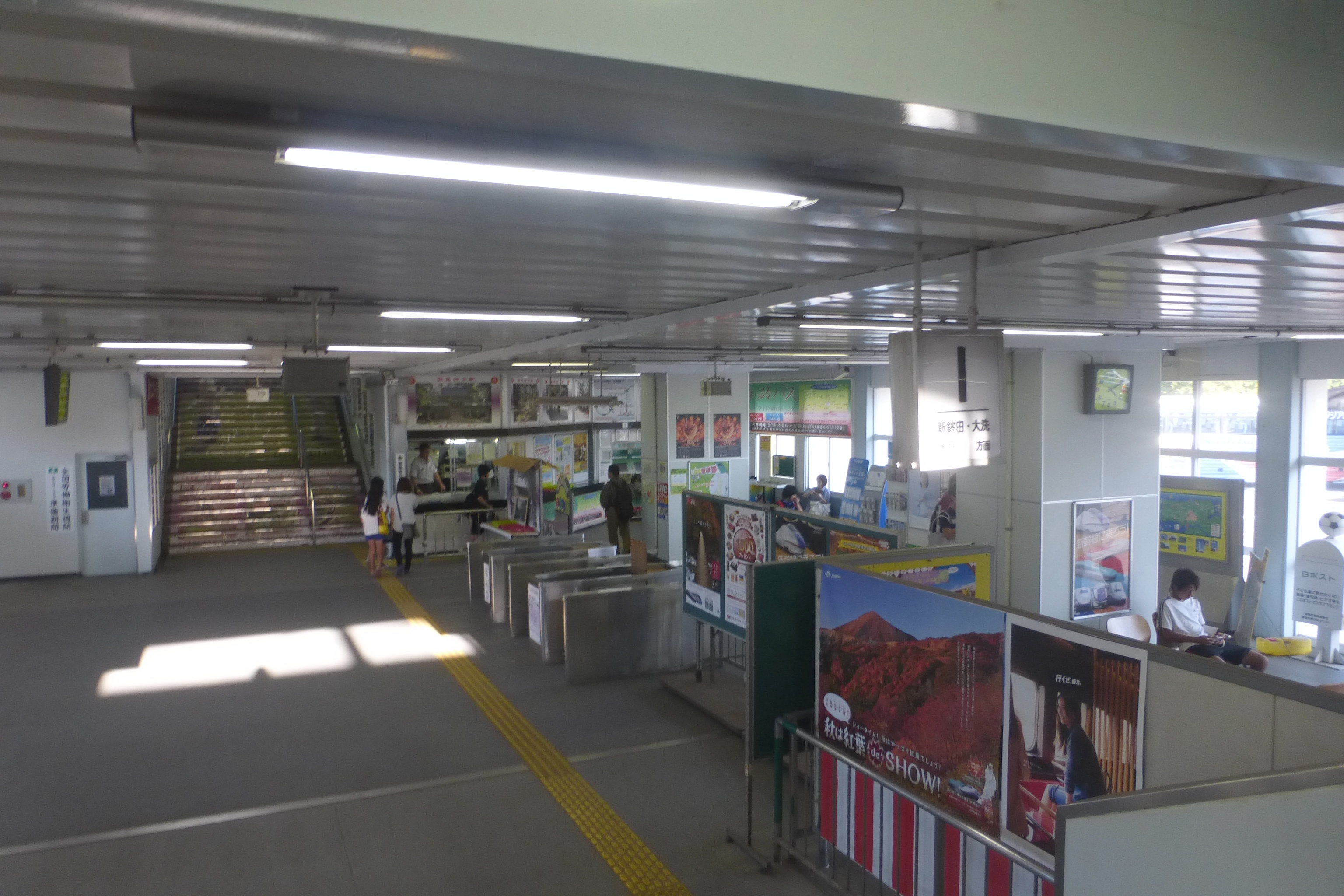 鹿島神宮駅の改札 (Kashimajingu Station ticket gate)